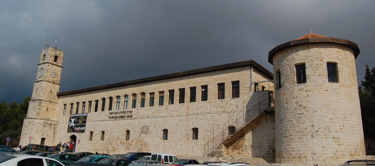 בניין הסראייה בצפת, בניין הממשל הטורקי ואח"כ הבריטי